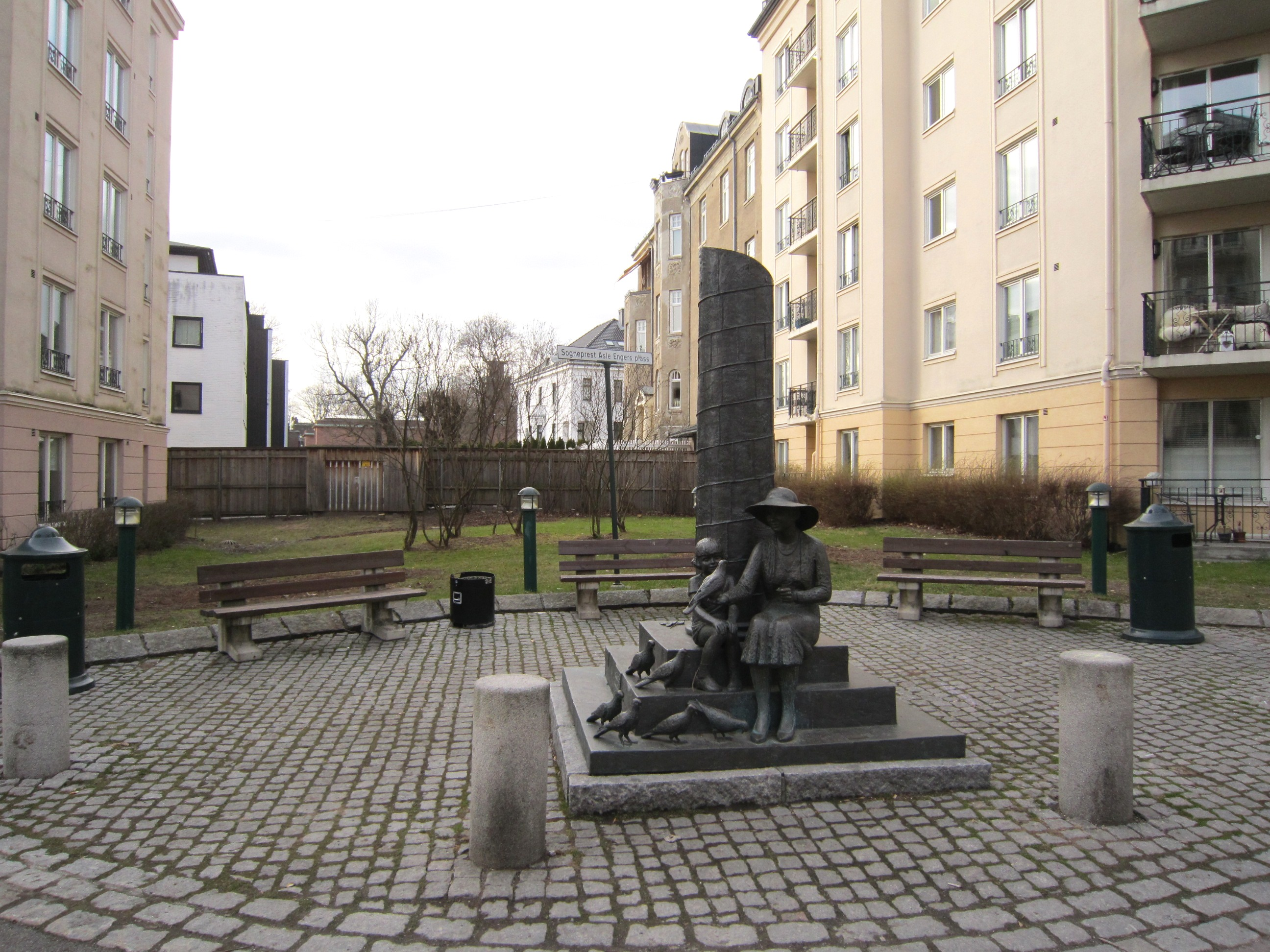 Sogneprest Asle Engers plass på Frogner